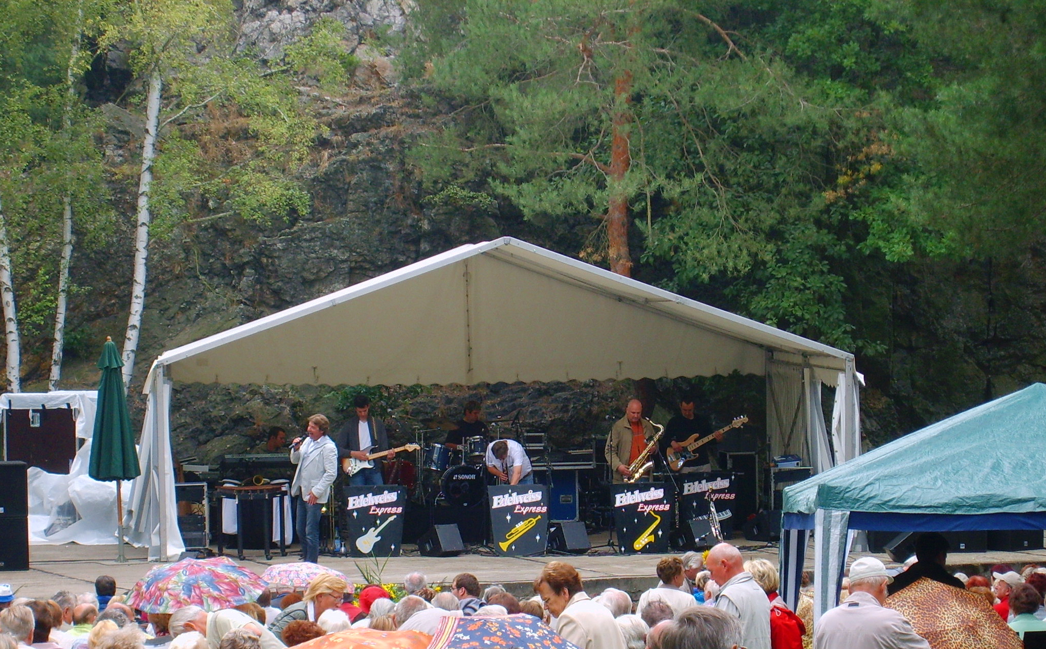 Freilichtbühne am Rothsteiner Felsen zum Felsenfest mit Patrick Lindner.